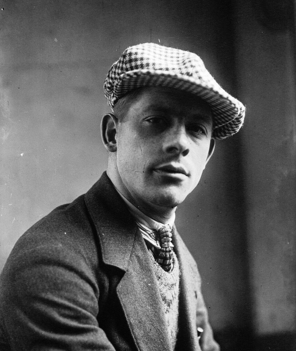 Fernand Saivé, pesage du Tour de France 1926